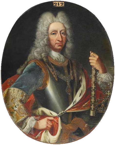 Victor-Amédée II (1666-1732), Prince de Piémont et duc de Savoie